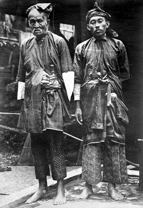 Repronegatief. Twee hoofden van Sarolangun in traditionele adatkostuums, Jambi, Oost-Sumatra